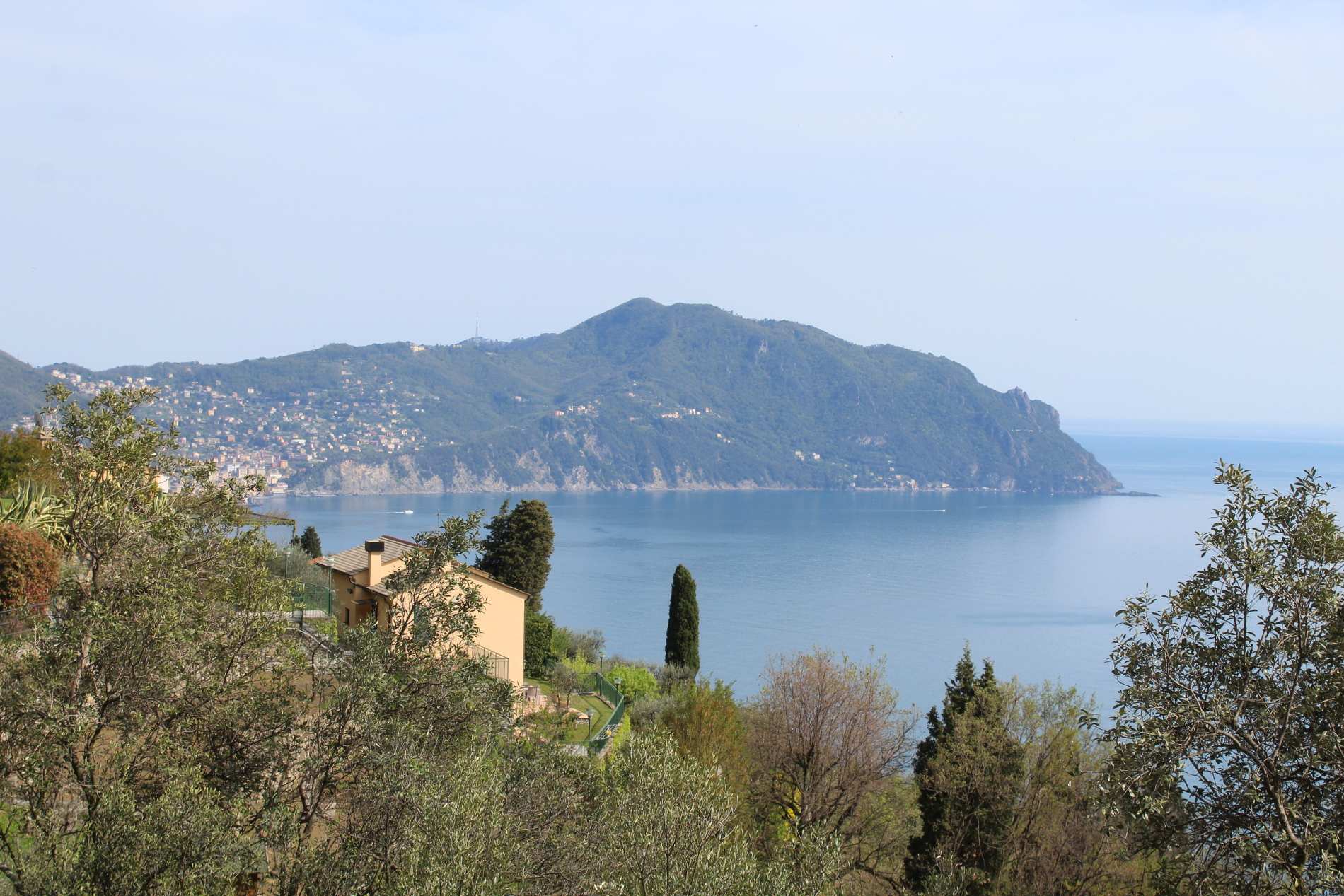 Il promontorio di Portofino visto da Pieve Ligure